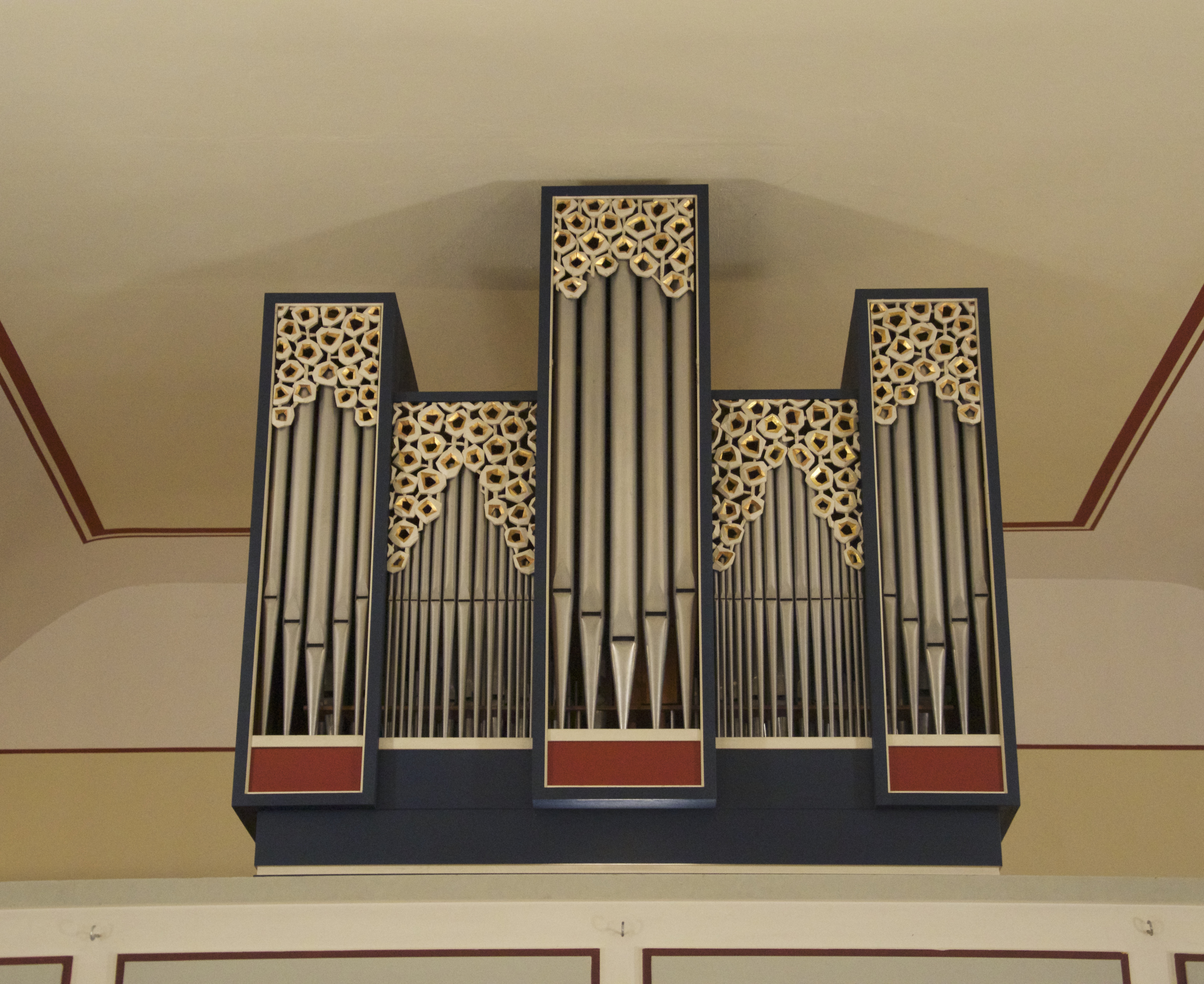 Prospekt der Janke-Orgel in der St. Martini-Kirche Jühnde